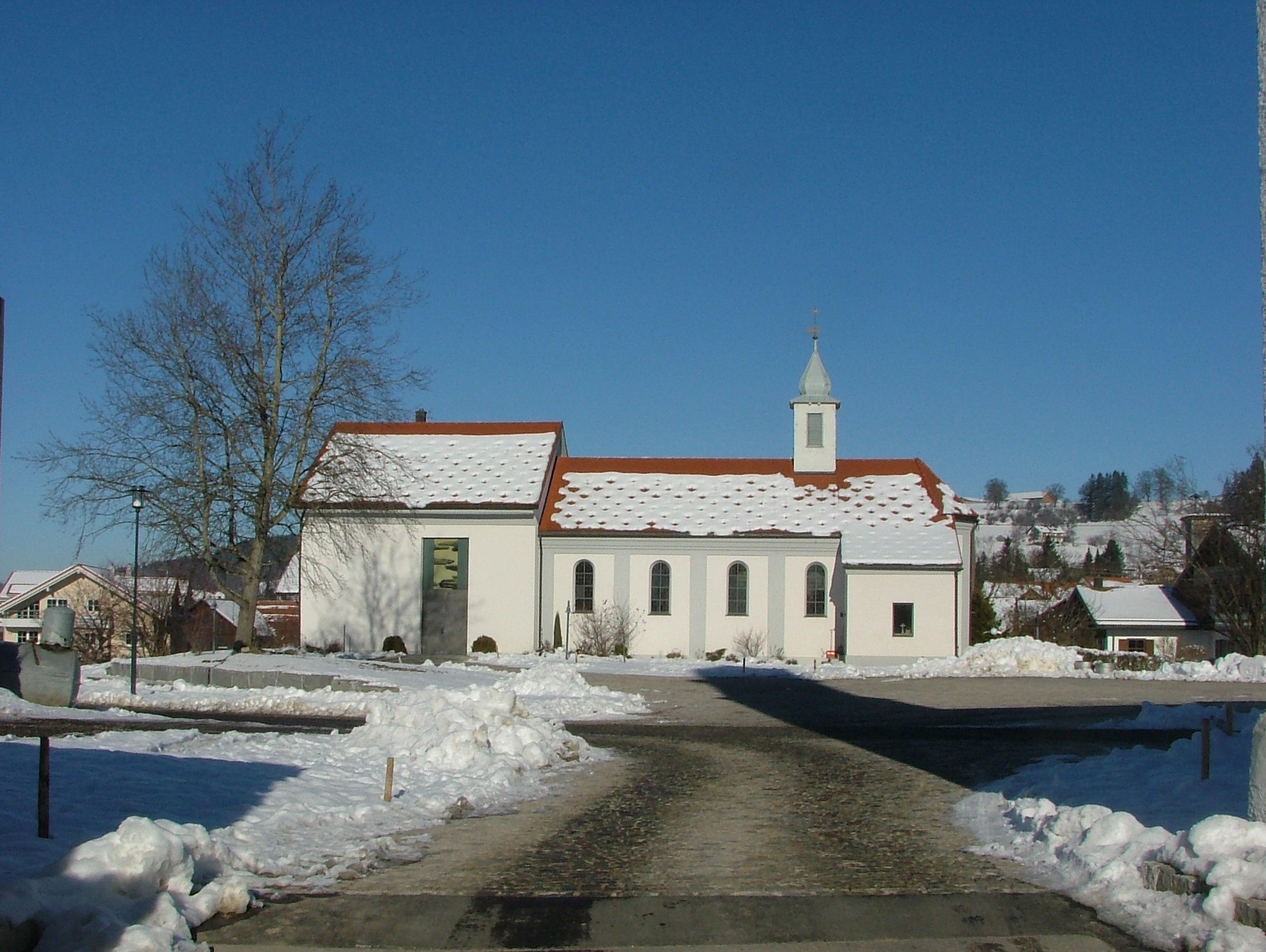 Börwang